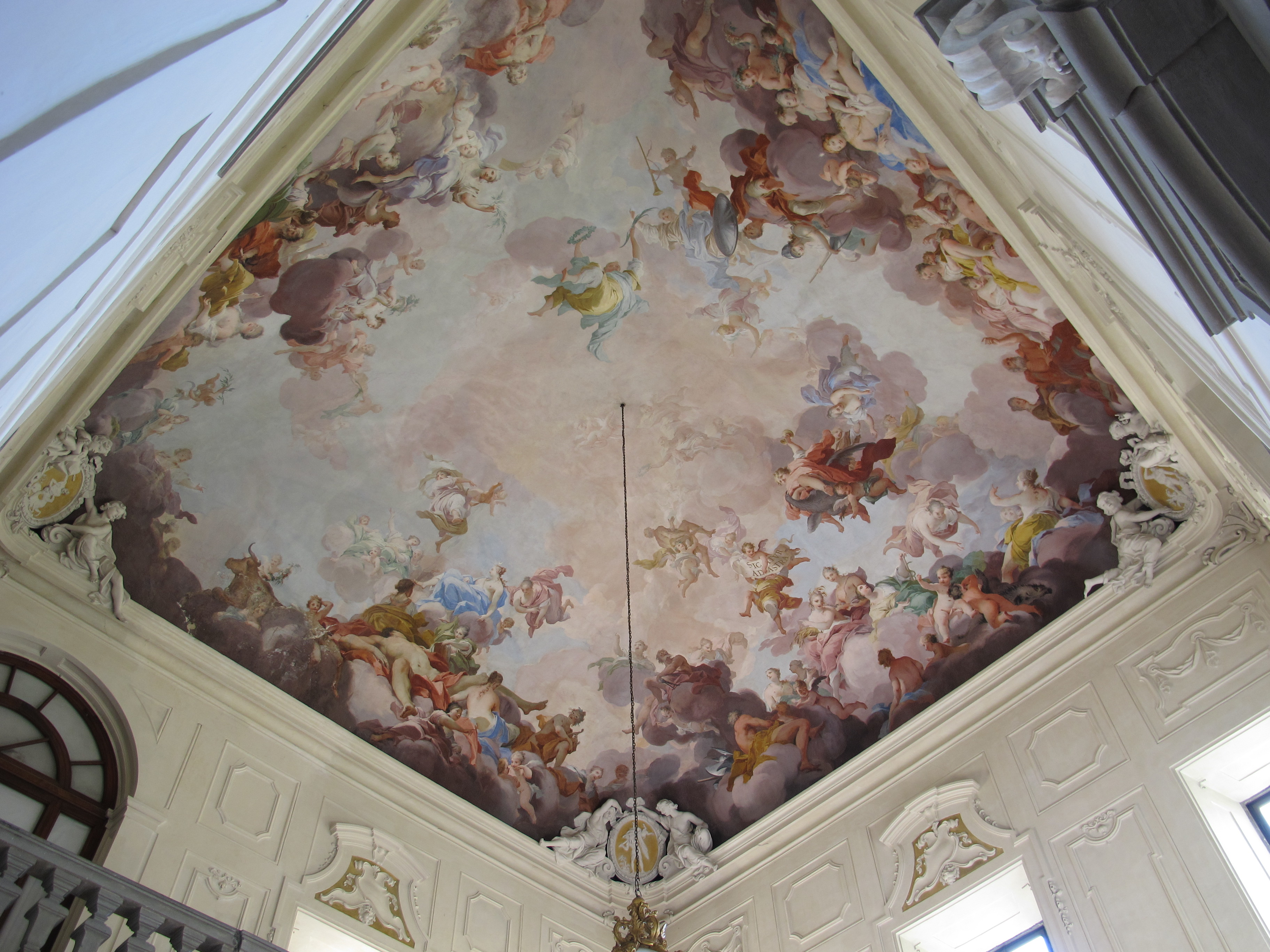 Palazzo di gino capponi, scalone monumentale, affreschi